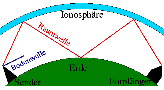 Abstrahlung der Boden- und der Raumwelle von einer Sendeantenne.